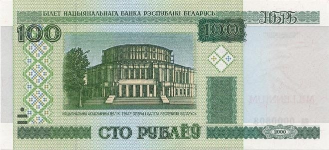 100 rubli białoruskich Milenium